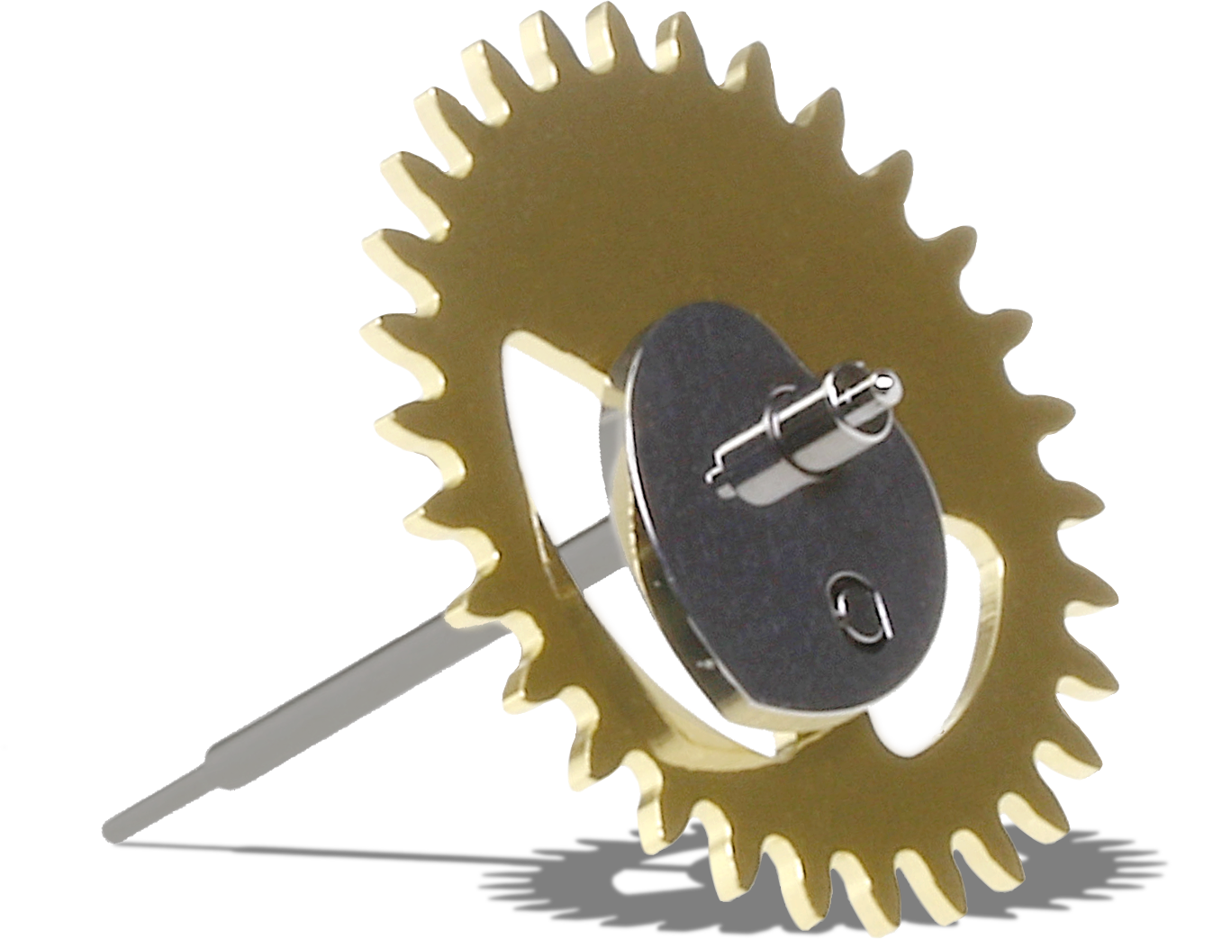 mobile horloger à cœur destiné aux organes du mouvement horloger destiné aux complications comme le chronographe